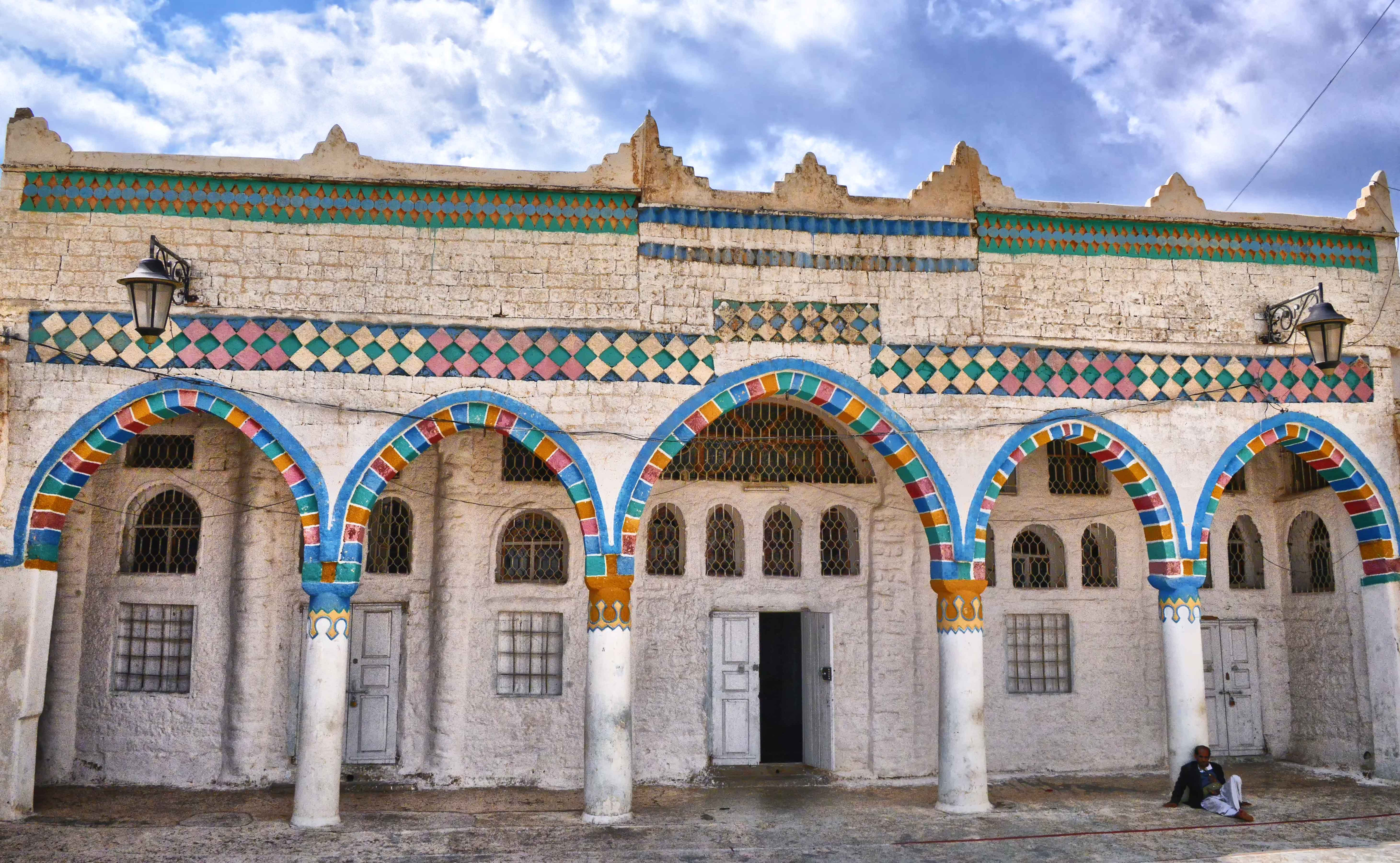 Mosque, Yemen